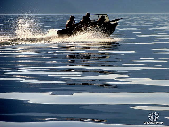 В маршруте по озеру. Июль 2008.